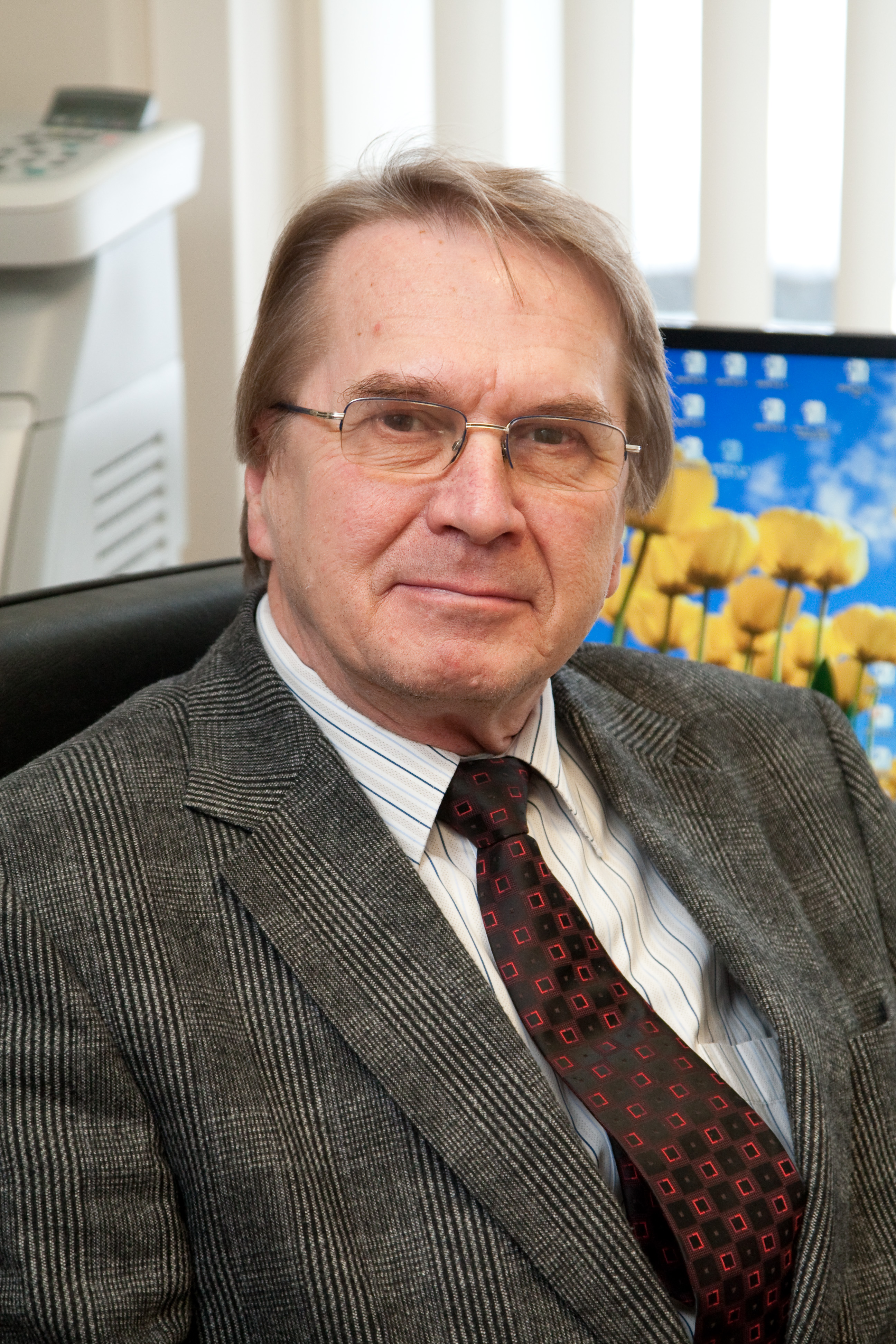 Mikroobigeneetika ja –ökoloogia uurimisgrupi juhataja geneetika professor Ain Heinaru.